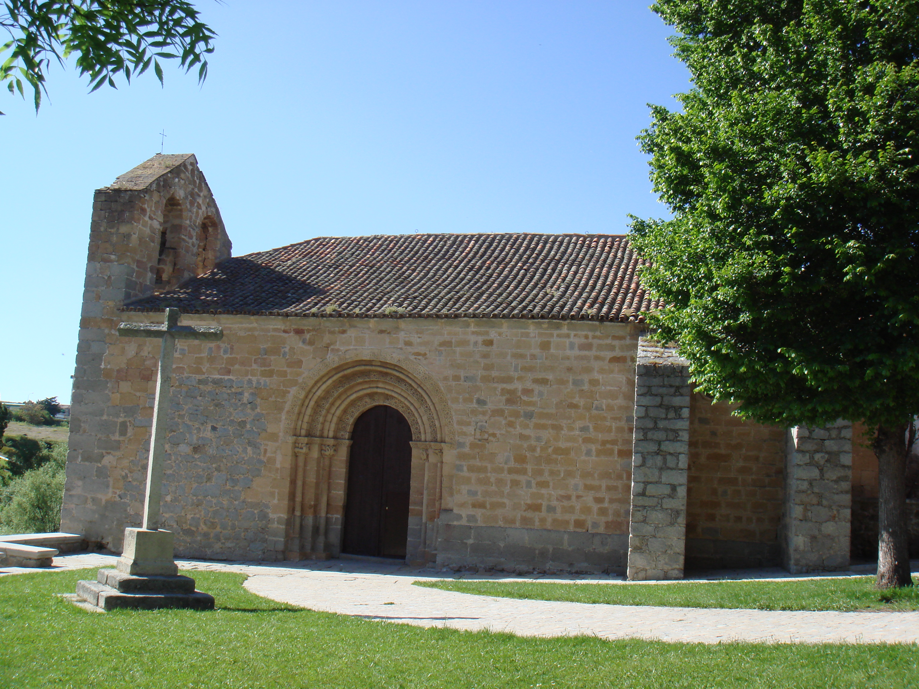 Iglesia de San Segundo de Ávila